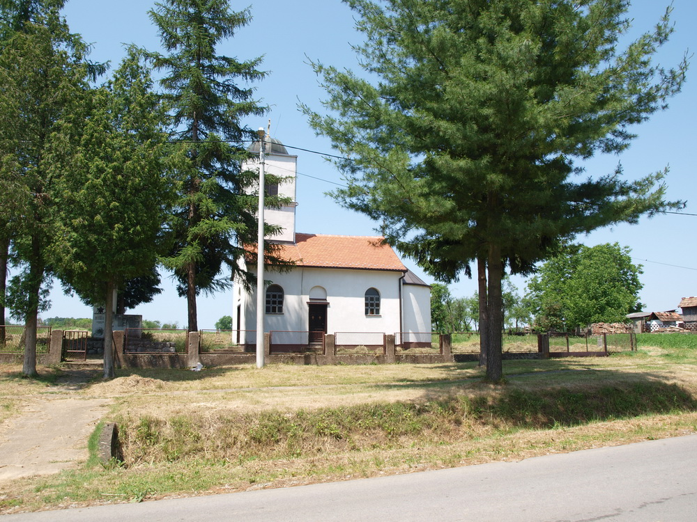 Kapela Sv.Kate u Novom Topolju, Brodsko-posavska županija.